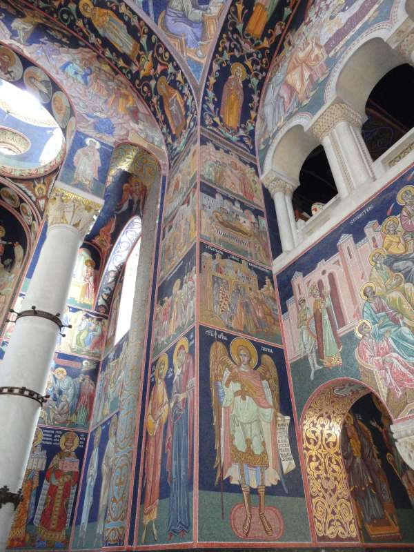 Mausoleo Real de Oplenac, Topola, Serbia